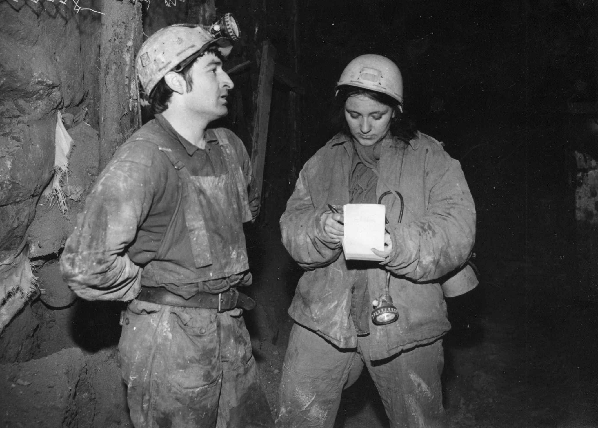 Novinářská návštěva, důl Hamr I na Českolipsku (podnik Uranové doly Příbram).